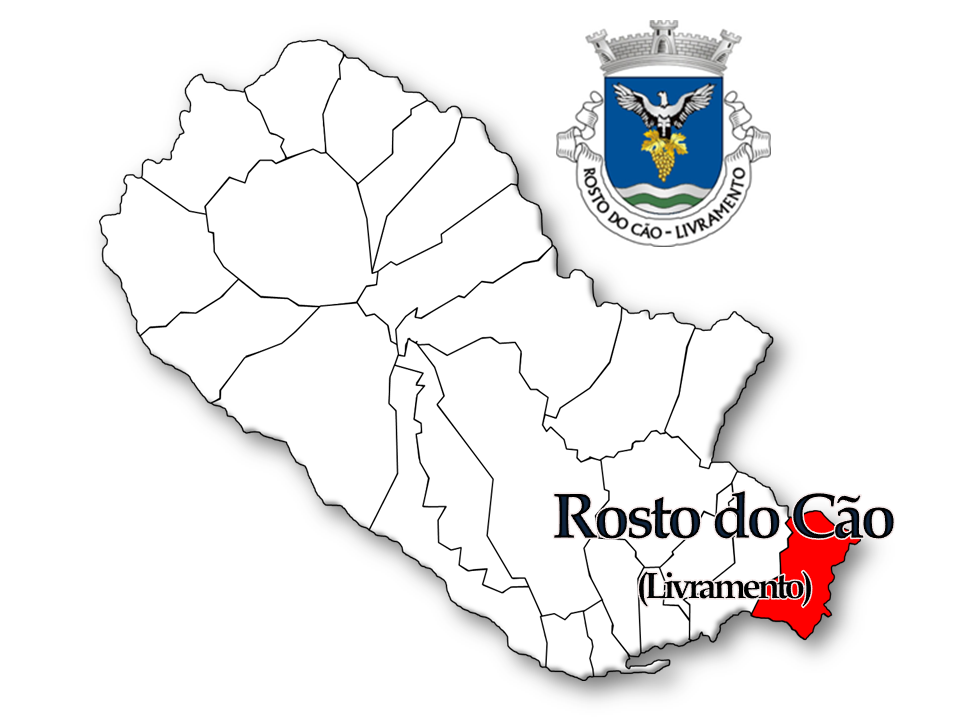 População